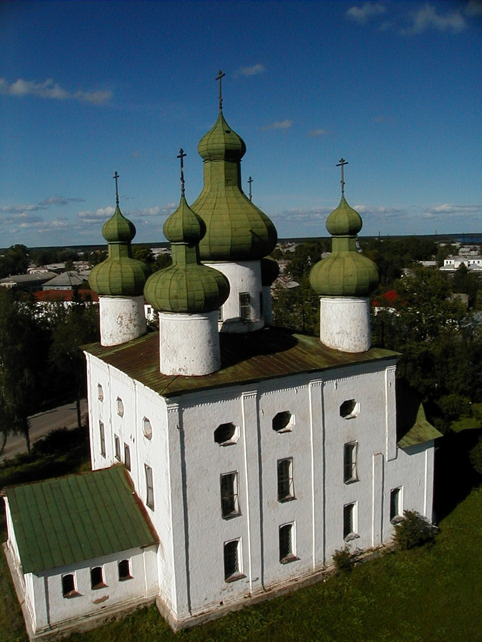 Церковь Рождества Иоанна Предтечи (Иоанно-Предтеченская церковь) (Архангельская область, Каргополь, Соборная площадь (бывш. Советская площадь))